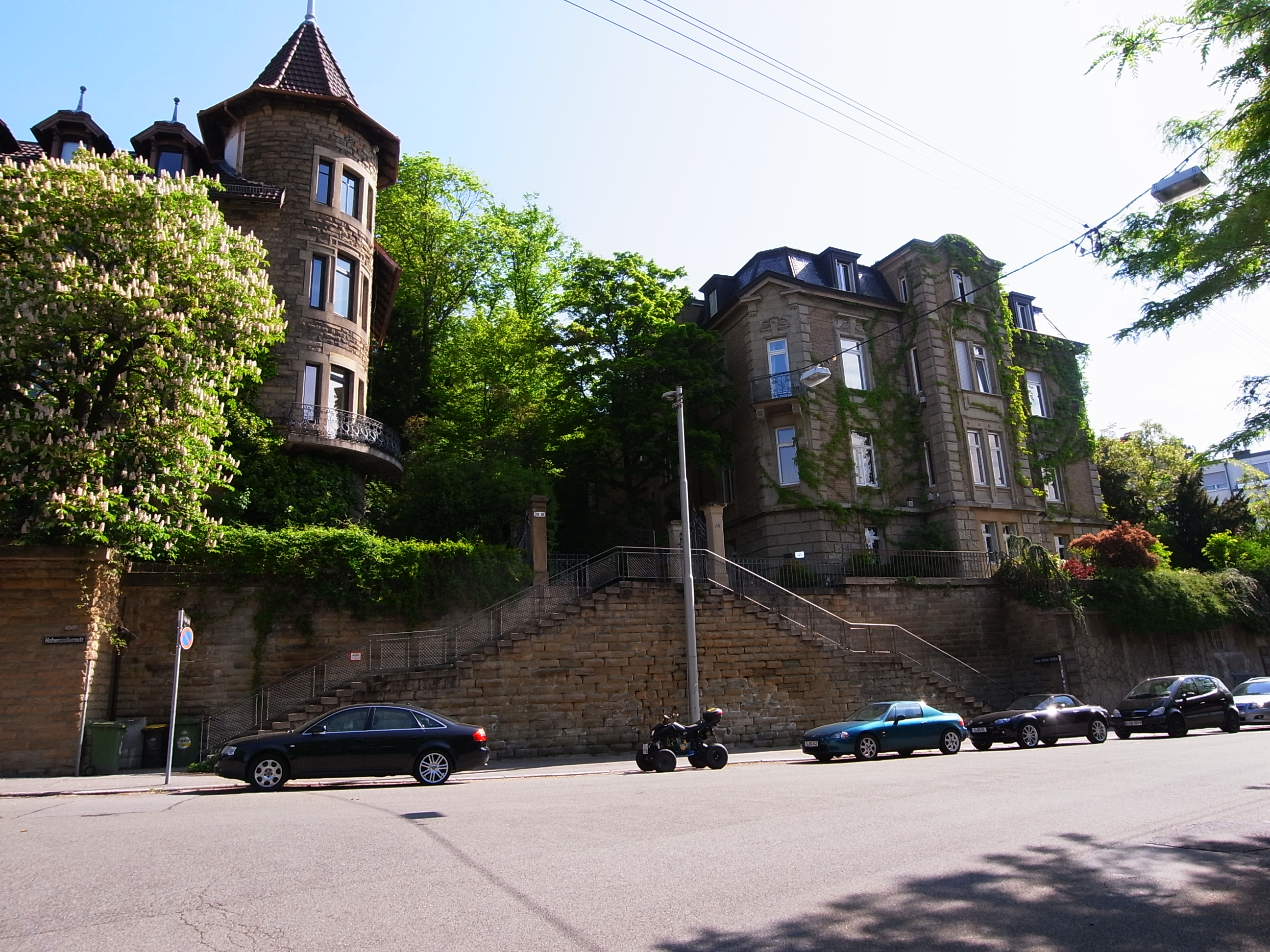 Die mächtige Eröffnung der Oscar-Heiler-Staffel zwischen Hohenzollern- und Humboldtstraße (2. Bild)